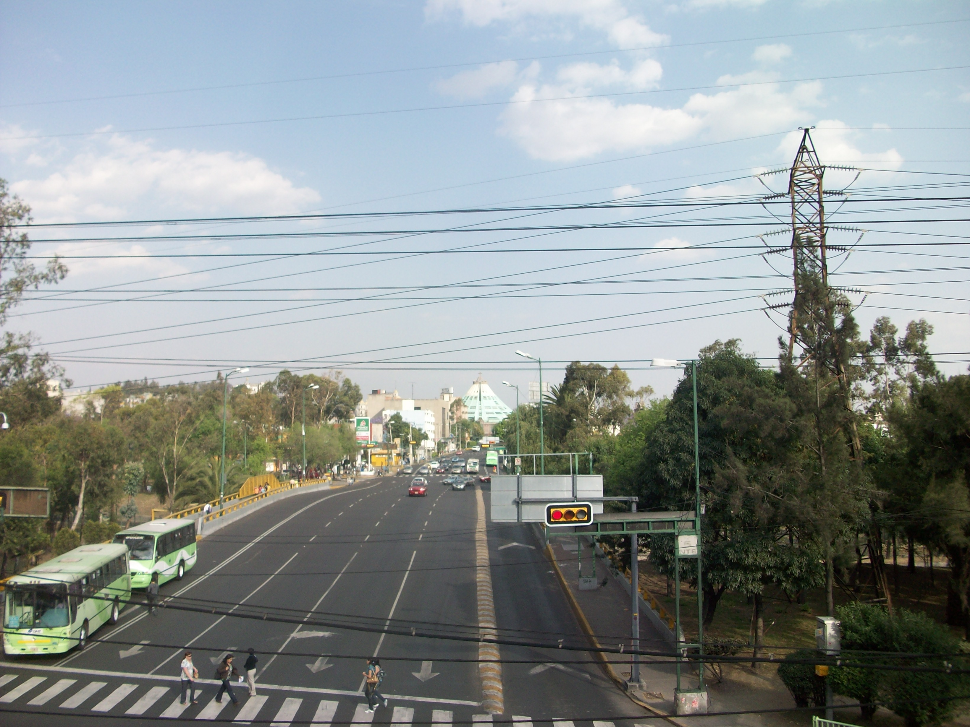 Avenida Montevideo